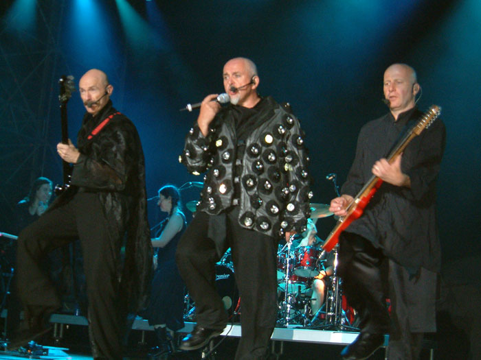 Bildbeschreibung: Peter Gabriel (mitte) zusammen mit Tony Levin (links) und David Rhodes (rechts) bei einem Konzert in Kaiserslautern am 2004-07-25 Fotograf/Zeichner: Christian Gerhardts Datum: 2004-07-25 Sonstiges: Erlaubnis des Fotografen zur Verwendung des Bildes in der Wikipedia liegt vor: Die Bilder von PG in Kaiserslautern kannst du verwenden mit entsprechendem Credit (Christian Gerhardts)